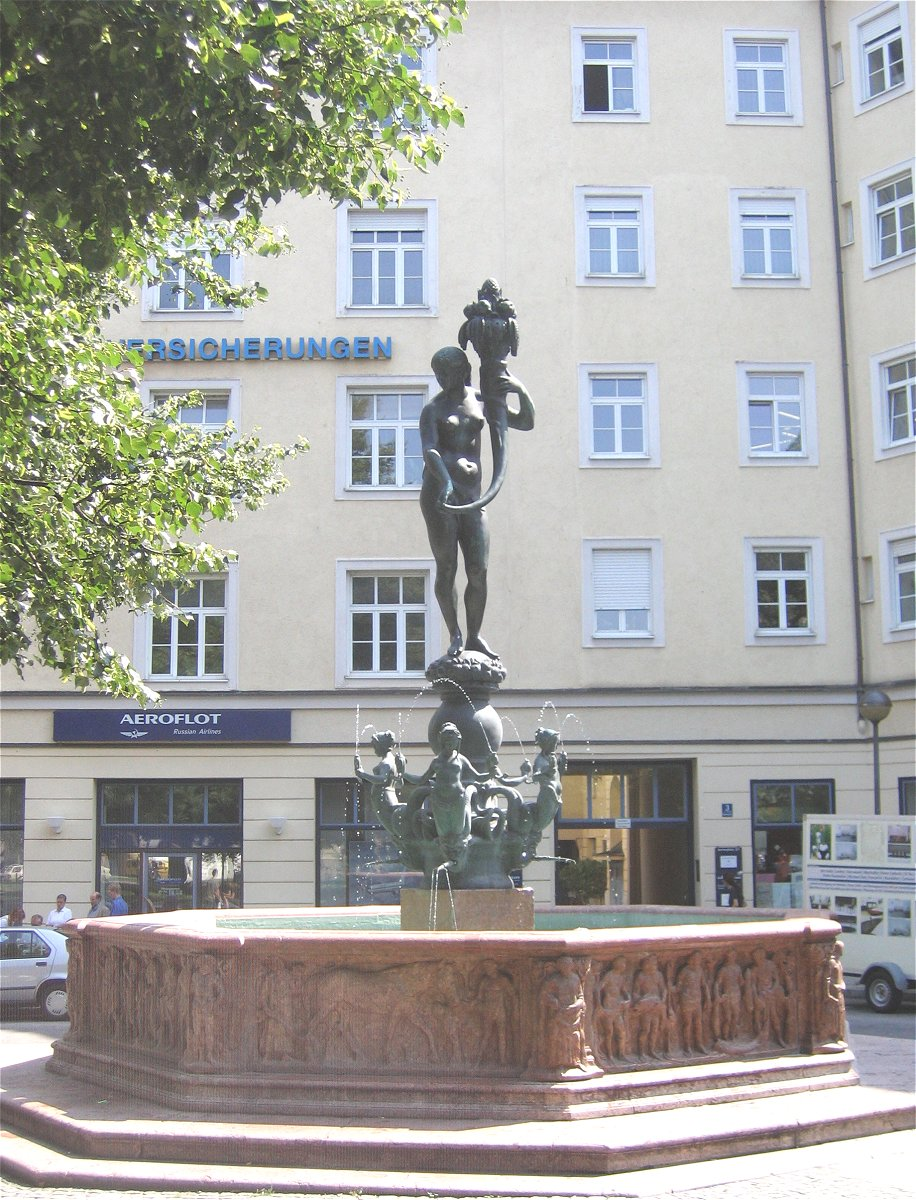 Fortunabrunnen von Karl Killer am Isartorplatz in München